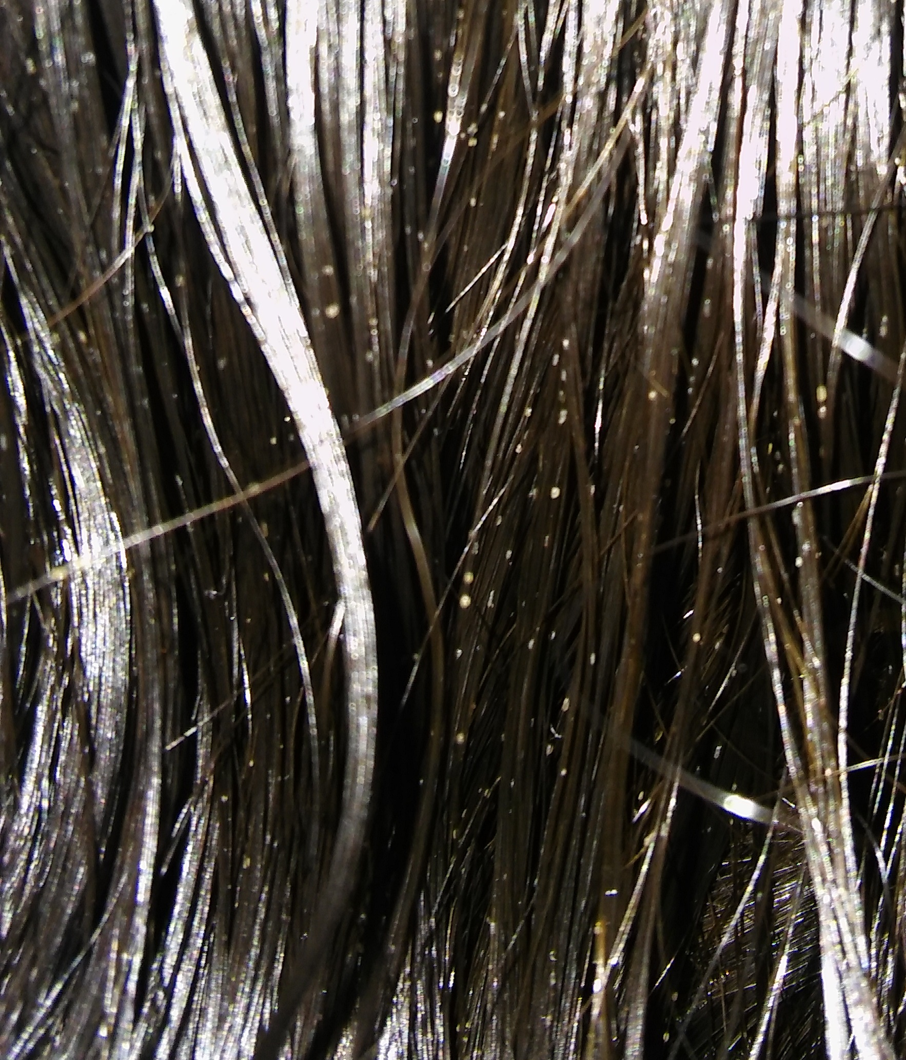 Enfermedad micótica por el hongo Trichosporon beigelii